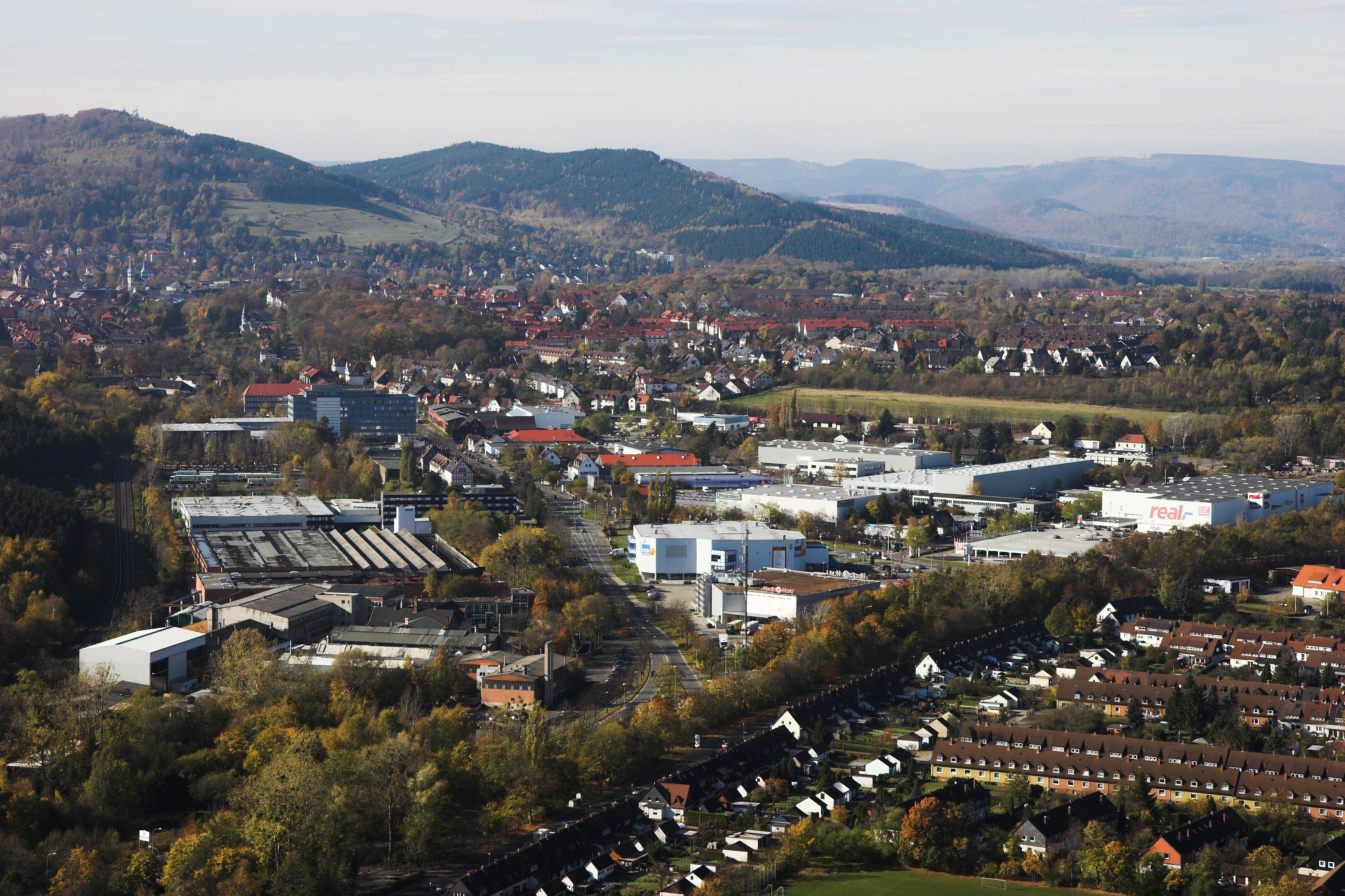 Blick auf Goslar vom Gipfel des Sudmerberges: vorn rechts Stadtteil Sudmerberg, dahinter Gewerbegebiet Gutenbergstraße; dahinter mittig Georgenberg, rechts Jürgenohl; hinten links Nordrand der Altstadt Goslar, dahinter der Steinberg